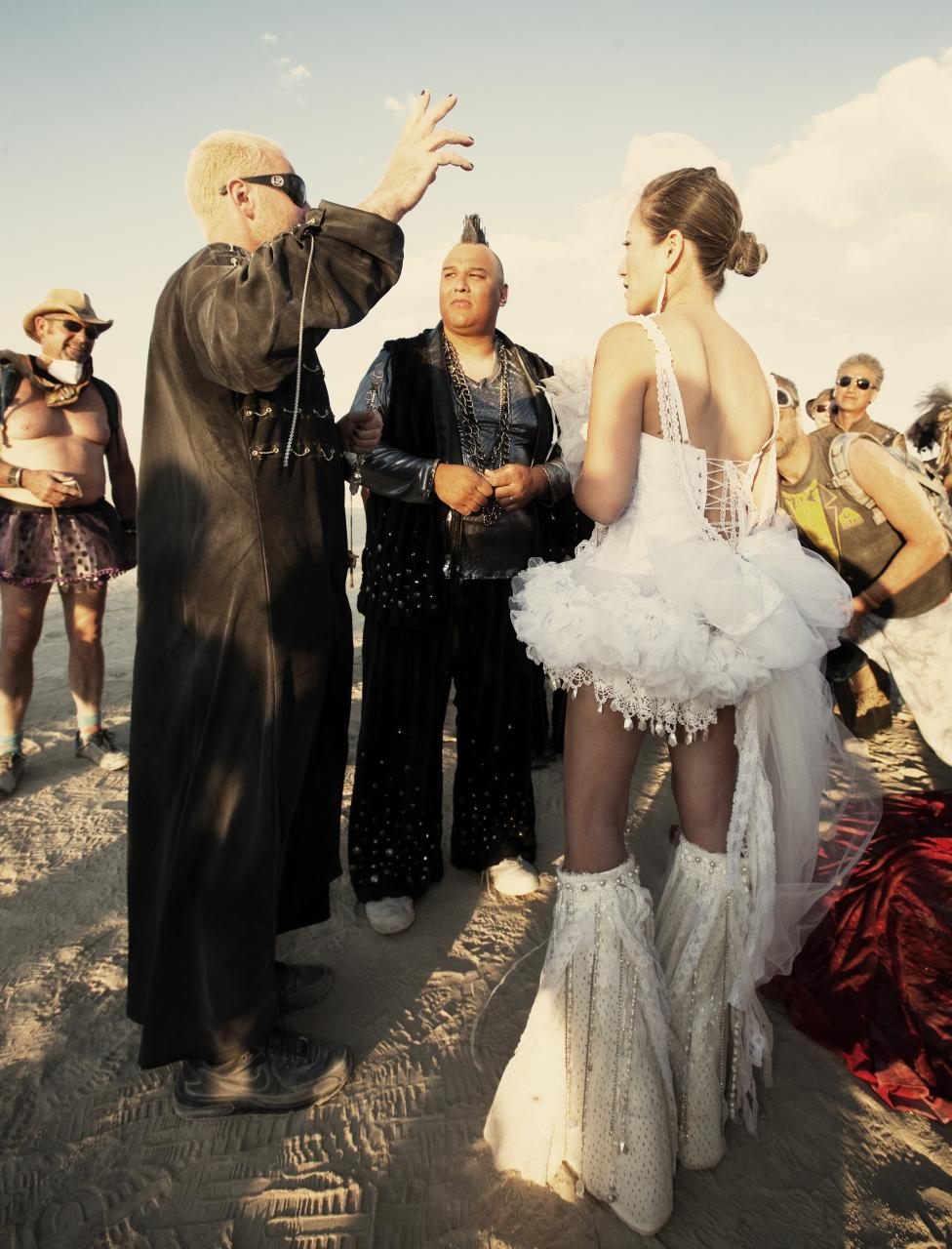 wedding